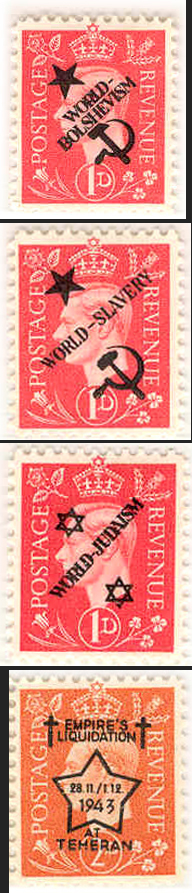 Deutsche Propagandafälschungen für Großbritannien aus dem Jahr 1944